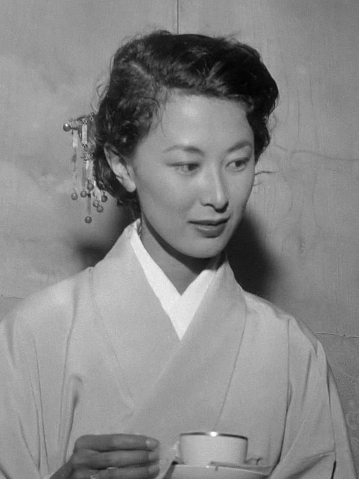 Persvoorstelling van filmechtpaar Yves Cjampi Kishi Keiko . Film "Typhoon boven Nagassaki " Floratheater 20 juni 1957